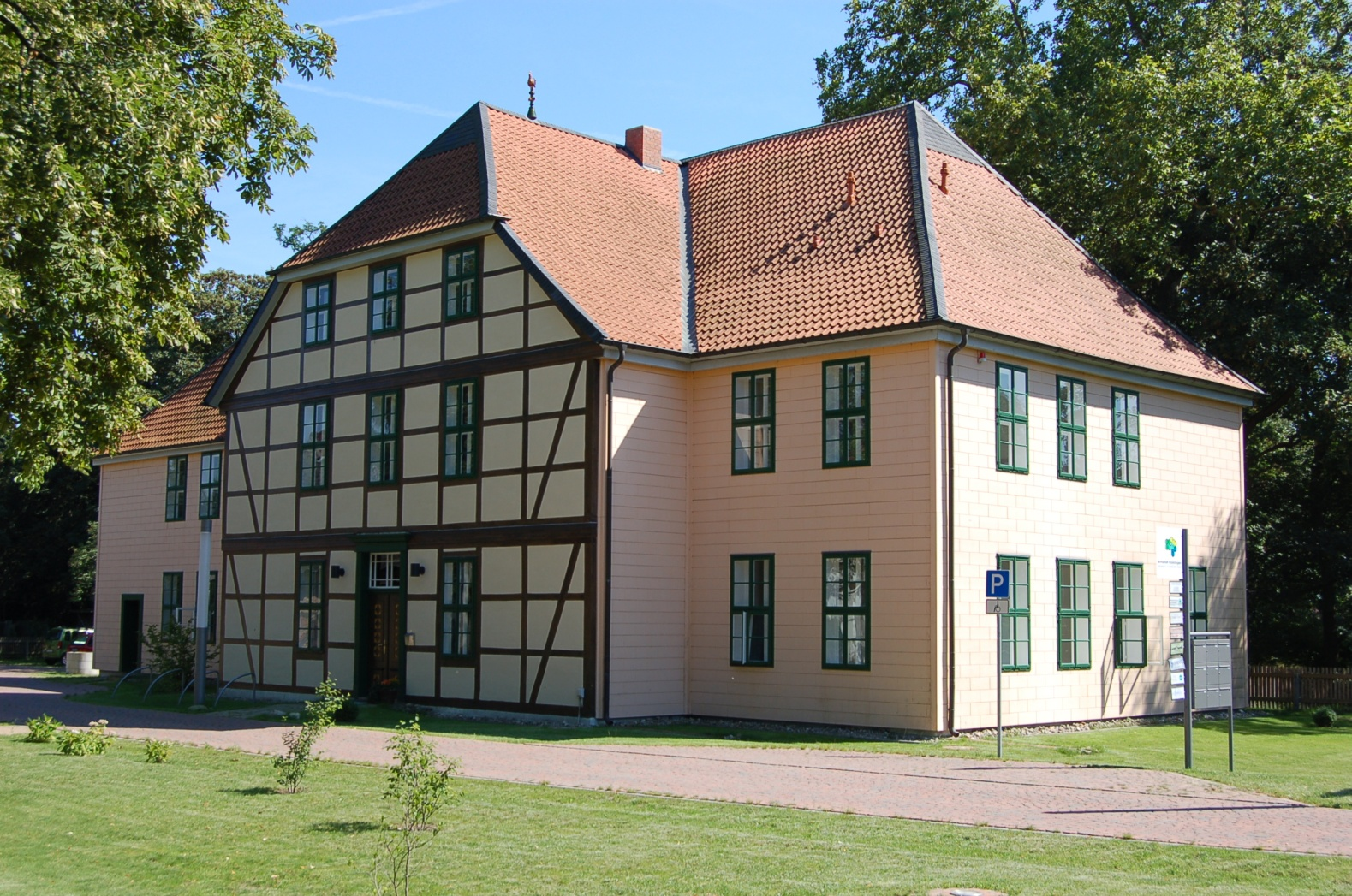 Ansicht Amtshof Eicklingen (2007)